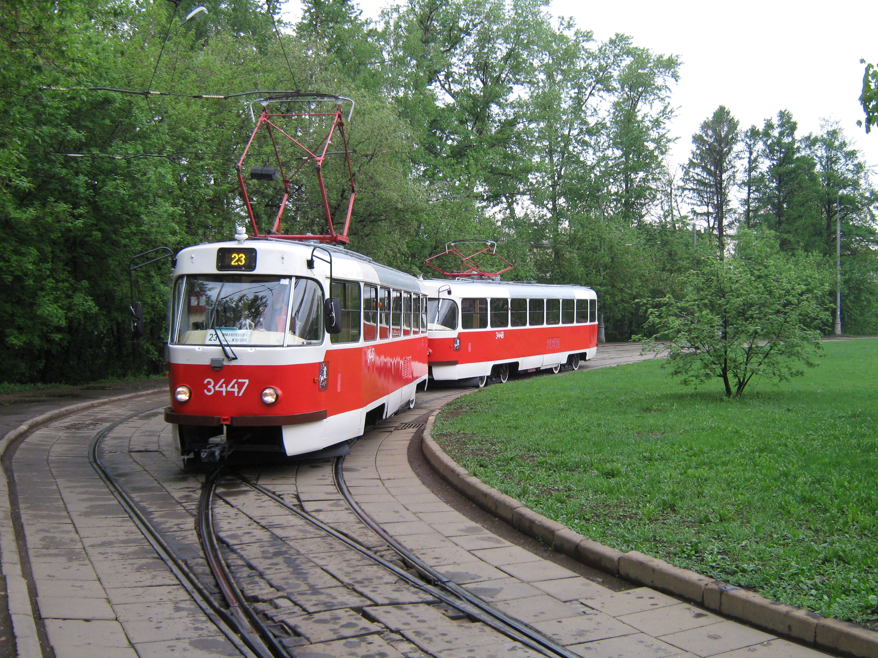 Модернизированный трамвай Tatra T3 (МТТЧ) в Москве.